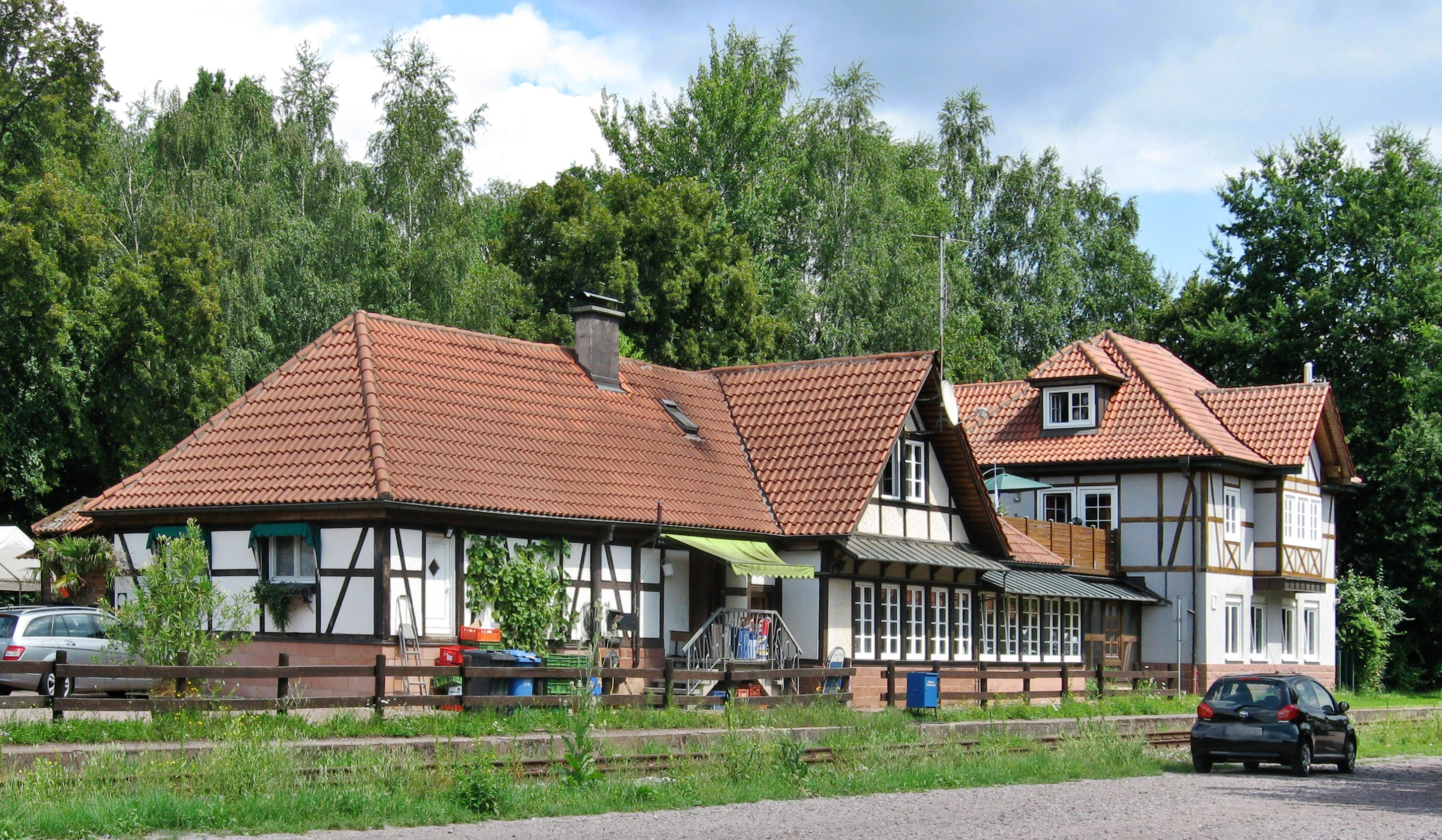 Ehemaliger Bahnhof in Reichenbach